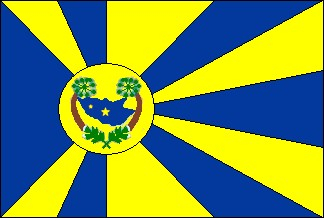 Bandeira de Alto Santo